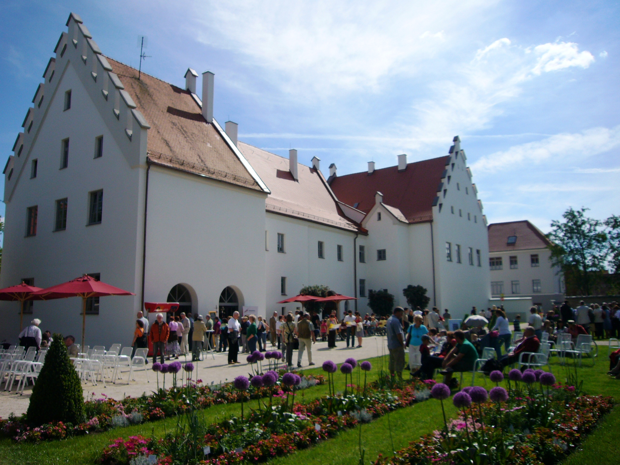 Kurfürstliches Schloss Rain